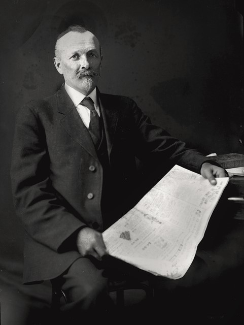 David Ouellet, architecte de Québec